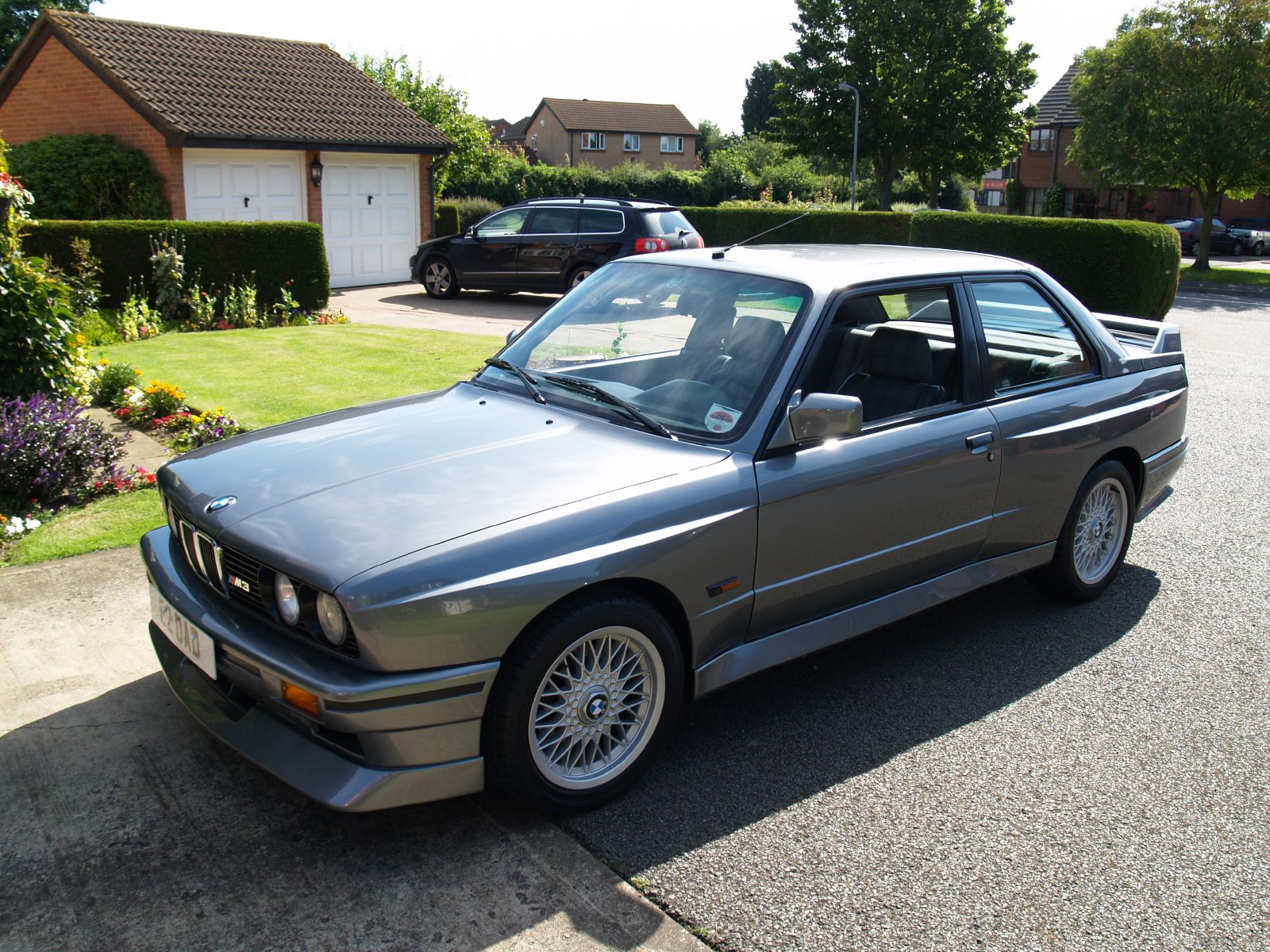 BMW E30 motor car